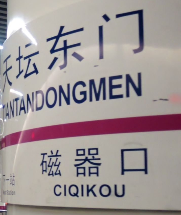 粵語: 天壇東門站嘅站牌